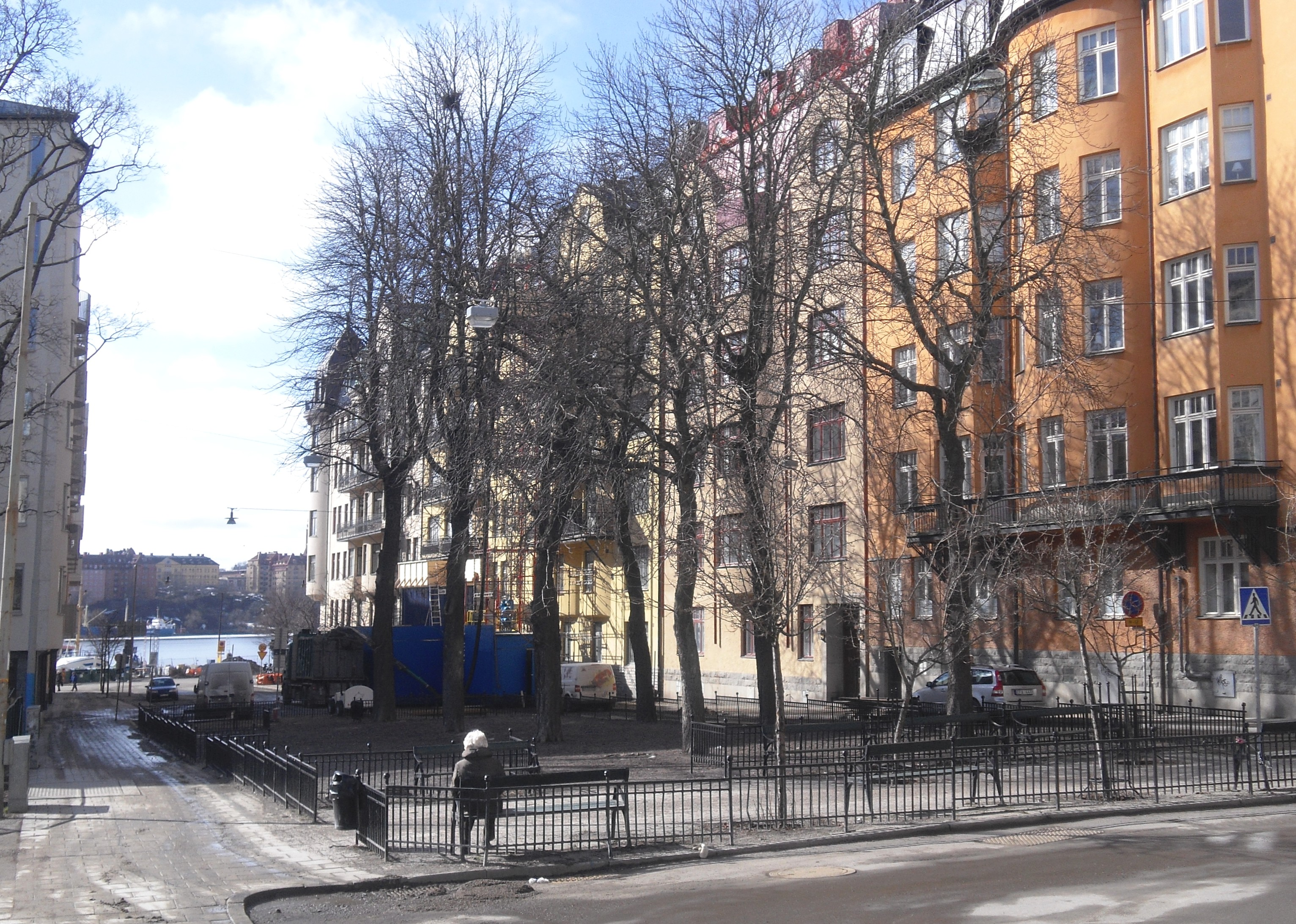 Kungsholms hamnplan, Kungsholmen, Stockholm. Vy från Garvargatan/Parmmätargatan mot söder (Norr Mälarstrand)